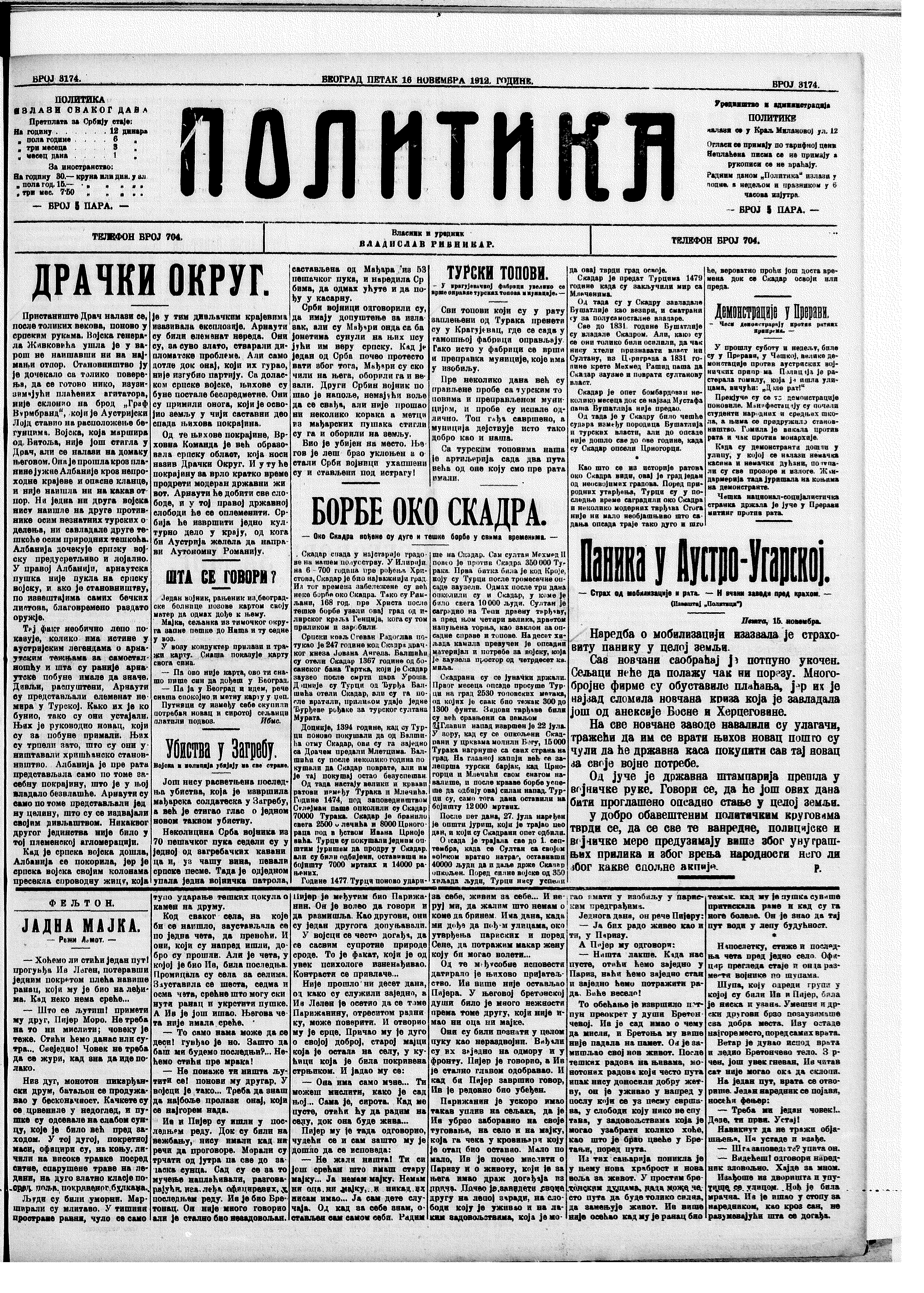 Naslovna stranica Politike od 16 novembara 1912 (po julijanskom kalendaru) sa udarnom vešću o osnivanju dračkog okruga.